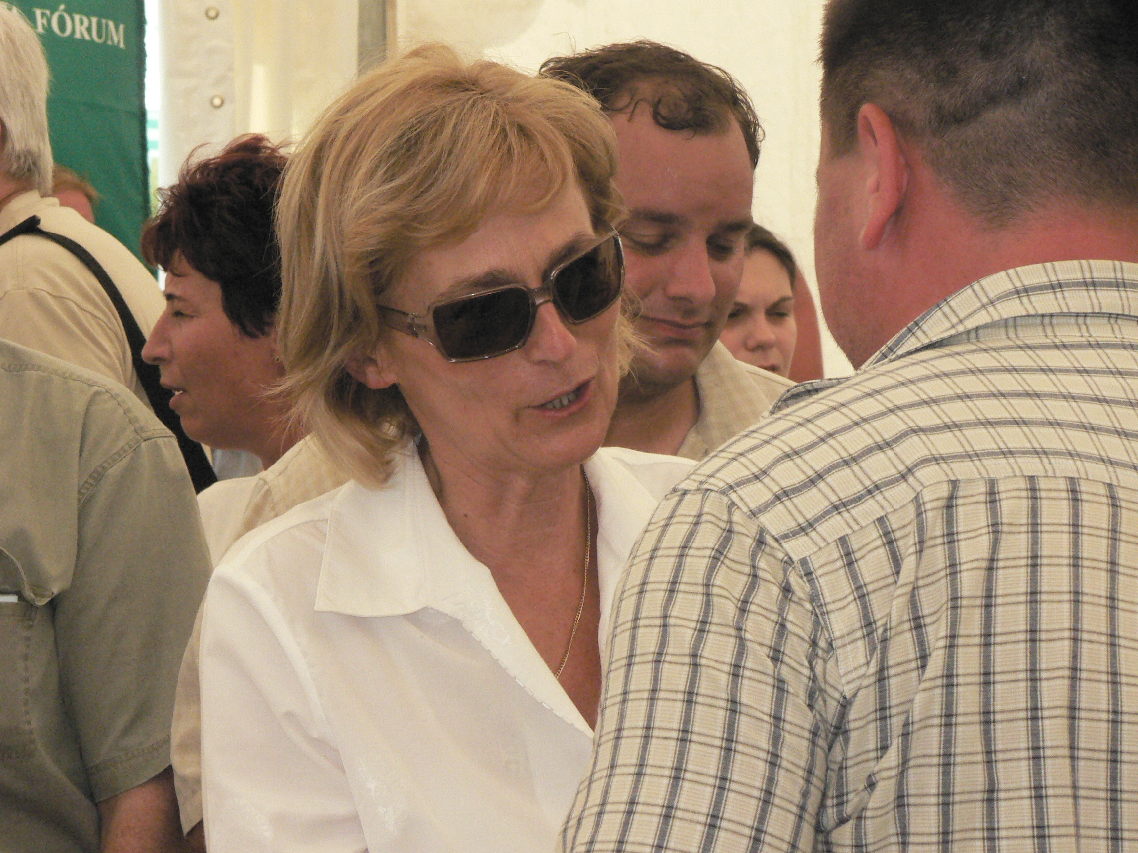 A Magyar Demokrata Fórum 2006 június 24 -én Somló hegyén tartotta összejövetelét. 15 évvel ezelőtt Antall József kormányfő itt jelentette be az orosz csapatok kivonását Magyarországról. A kép korábban Creative Commons alatt megjelent a Metapolisz 2 DVD -n (ISBN: 963-06-0412-4)